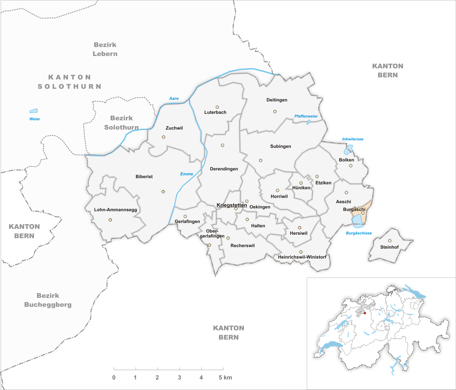 Municipality Burgäschi Artist: Tschubby